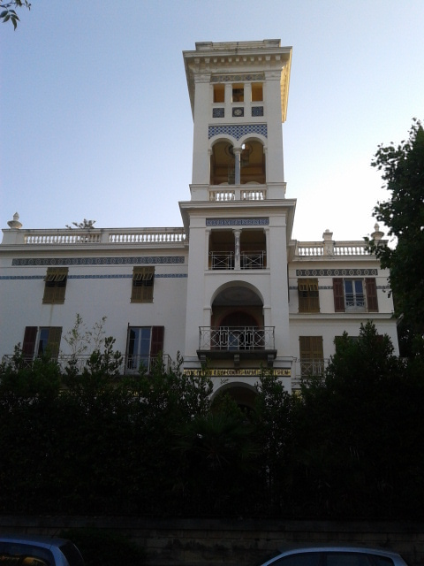 Vue frontale de la Villa Bischoffsheim